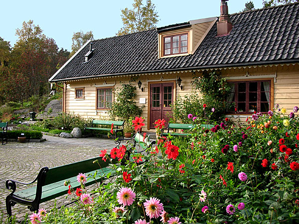 Dahliablomstring utenfor Blondehuset. Blondehuset ligger i Arboretet og har enkel servering (vafler, kaffe og is) i helgene mai til september. Blondehuset er et gammelt bergenshus som tidligere stod i Haukelandsveien 29. Men da Haukeland sykehus skulle utvide i 1973 måtte huset rives. Det ble tatt ned planke for planke, nøye målt og tegnet av, det hele overvåket av Gamle Bergen museum. Materialene ble lagret i en gammel løe på Milde i mange år. Takket være initiativ fra Bjarne Rieber og Jacob Neumann ble huset gjenreist i Arboretet i 1992. Vi vet ikke når huset ble bygget, men historien kan i alle fall føres tilbake til 1840-årene.